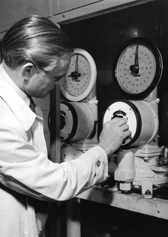 5.11.1953 Köln Parfümfabrik "4711" Durch diese Steigleitung wird das Kölnisch-Wasser vom Keller zur Abfüllung geleitet